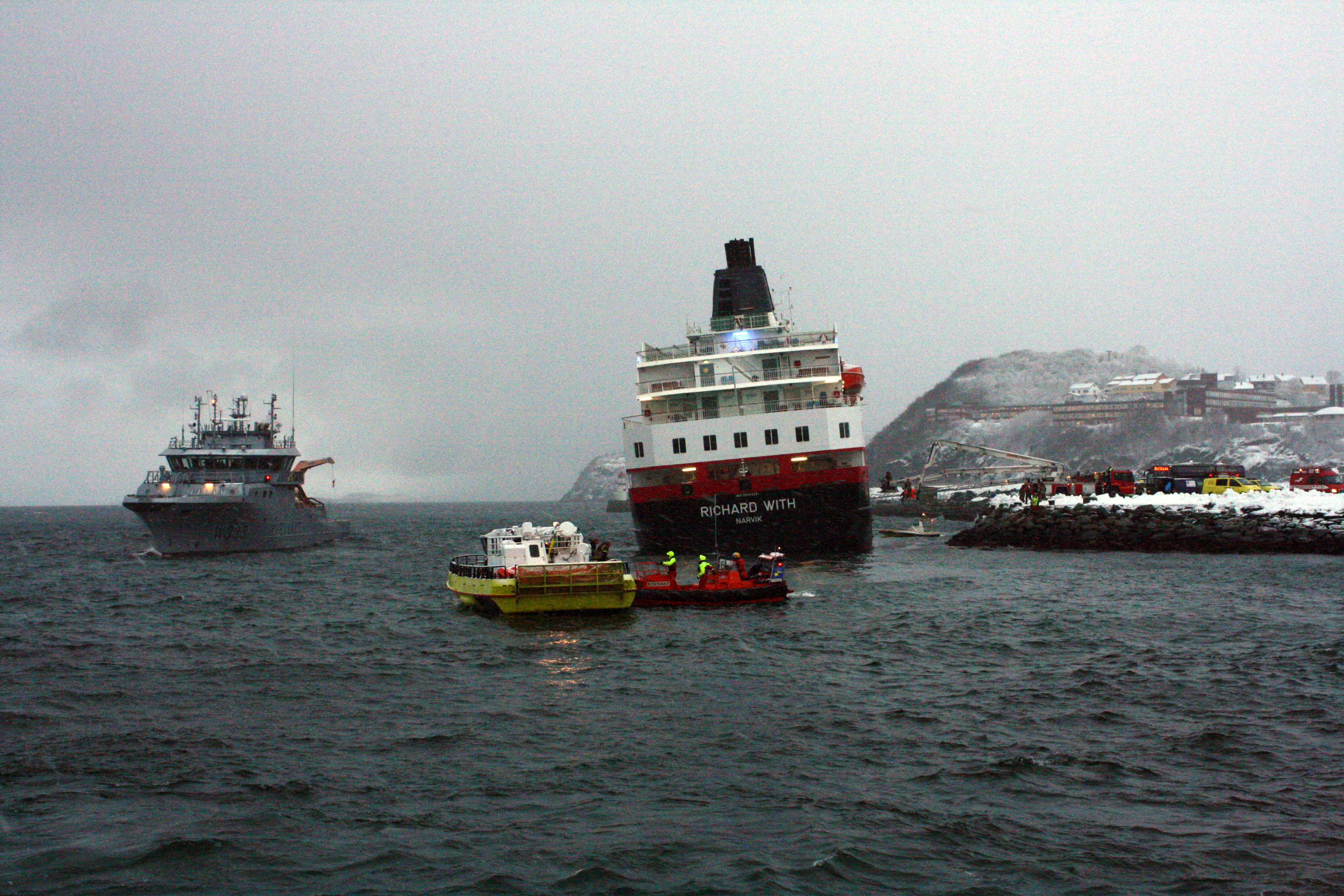 På det meste får MS Richard With seks grader slagside. Til venstre kystvaktas KV Njord.